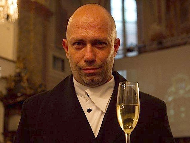 Fotografie pořízená před slavnostní premiérou skladby Hlasy světla 3D.